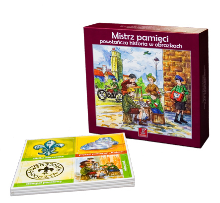 Mistrz pamięci, wydany przez Muzeum Powstania Warszawskiego